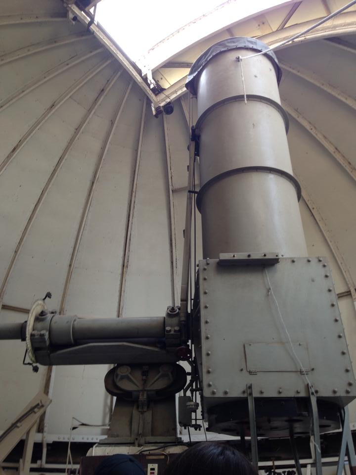 Interior del observatorio Manuel Foster Recabarren